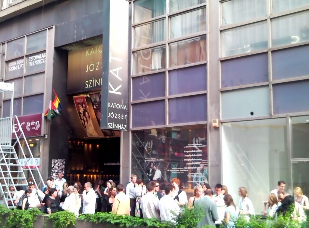 Katona József Színház, Budapest